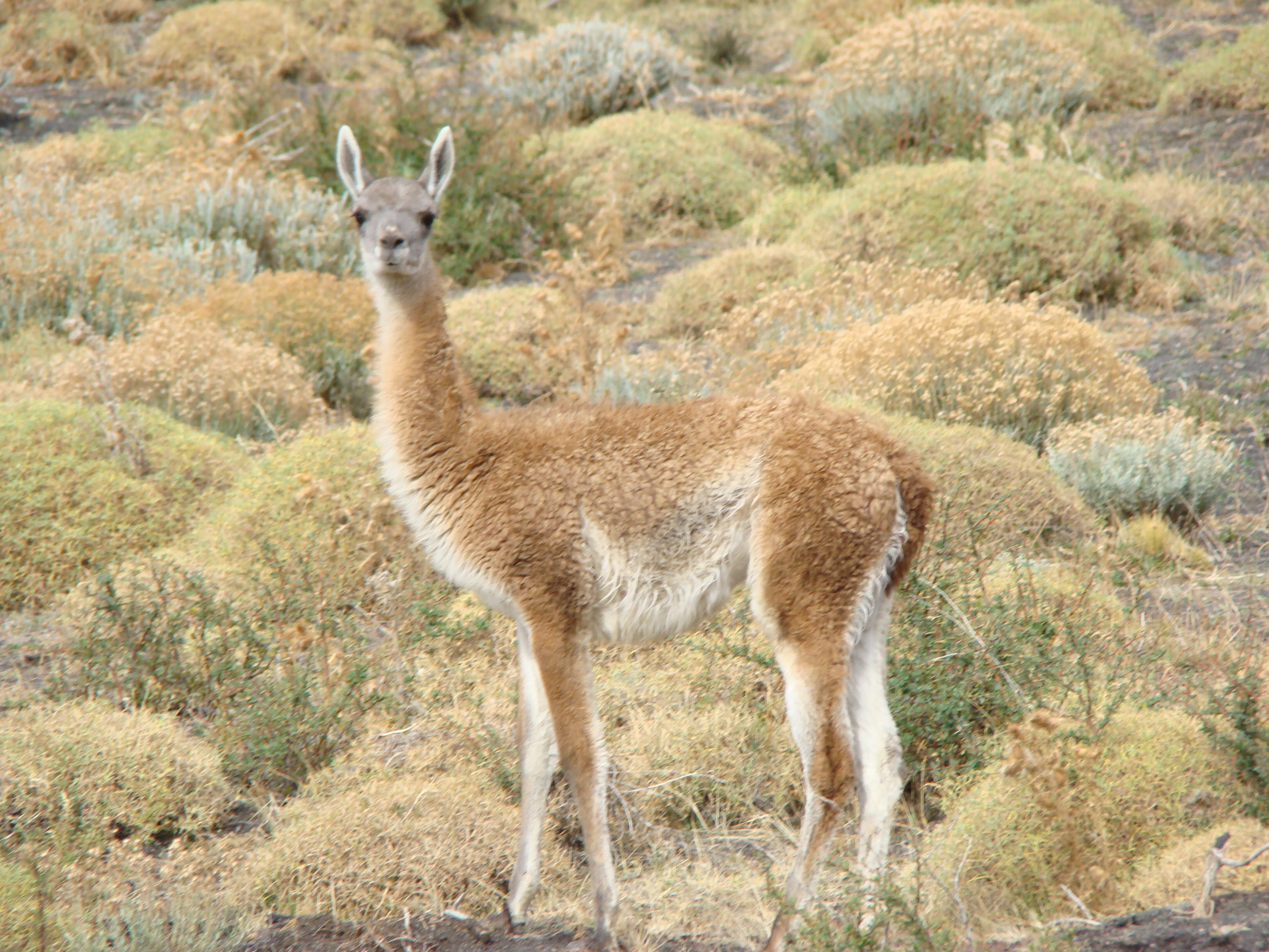 Llama. Patagonia, Argentina.